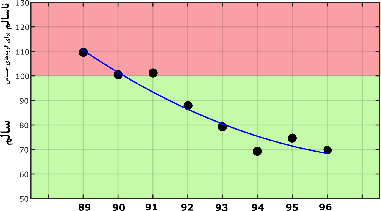 متوسط سالیانه‌ی شاخص آلودگی هوا در تهران، اندازه‌گیری‌شده در ایستگاه سازمان هواشناسی (اقدسیه، منطقه یک تهران) برای سال‌های ۱۳۸۹ تا ۱۳۹۶. روند کاهشی میزان آلاینده‌ها نیز نشان داده شده است. منبع داده‌ها وب‌سایت شرکت کنترل کیفیت هوای تهران است.